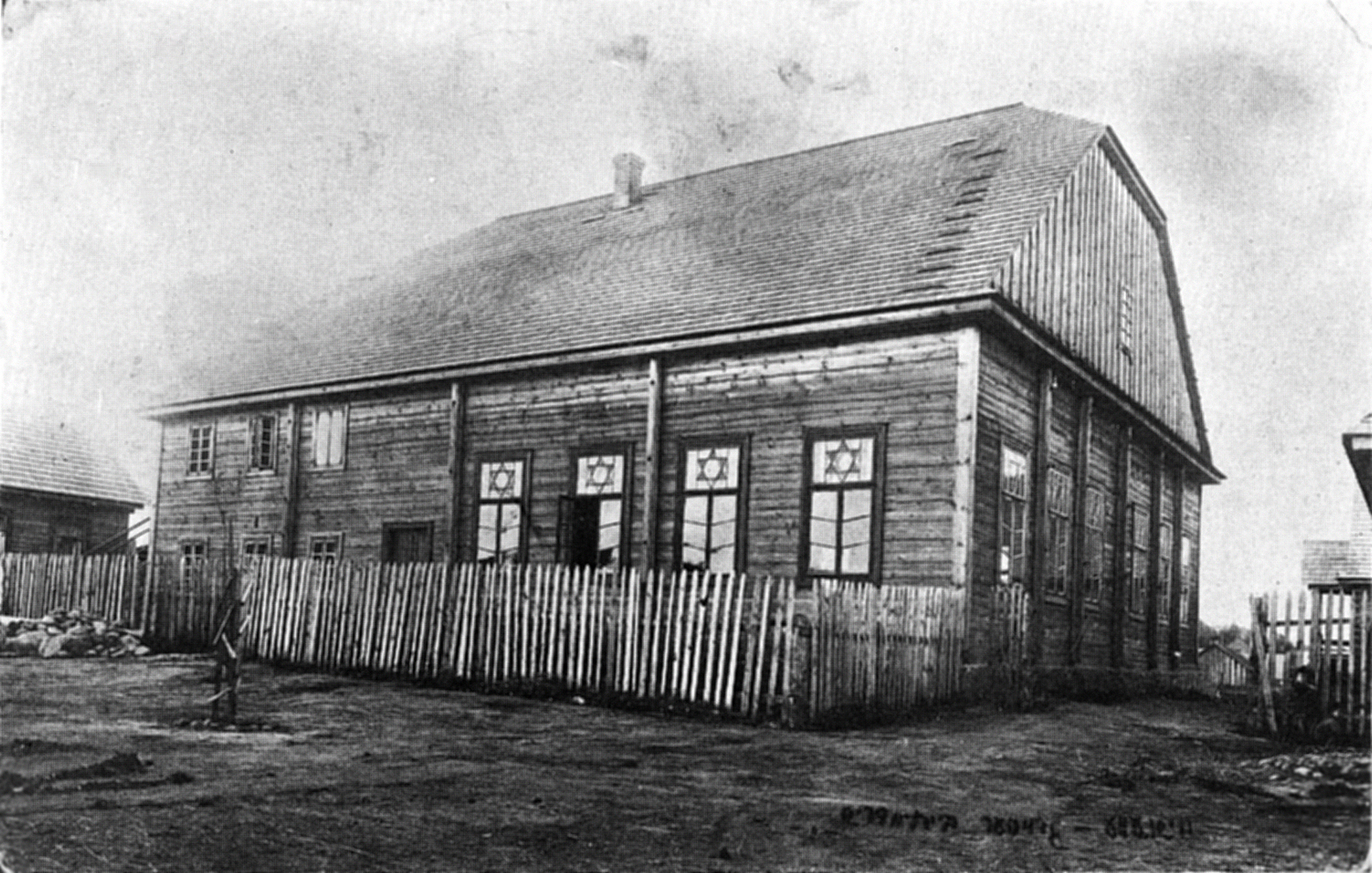 Беларуская (тарашкевіца): Вішнеў (Višnieŭ). Сынагога